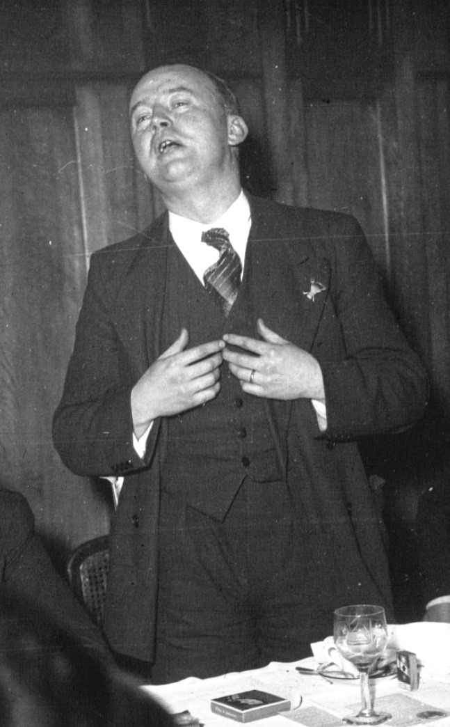 Henri Dorgères en 1937.